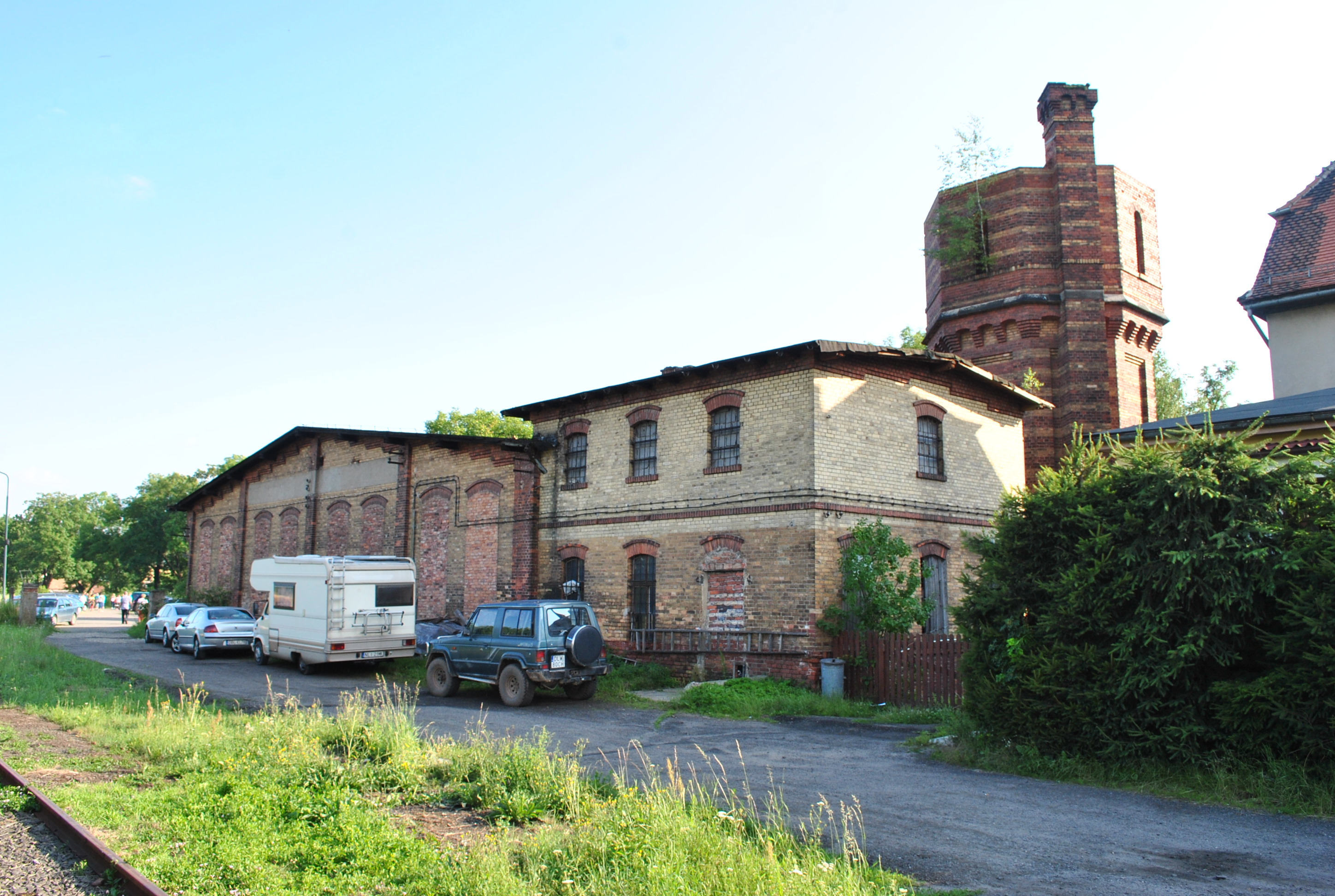 Dawna lokomotywownia i wieża wodna na stacji Lwówek Śląski